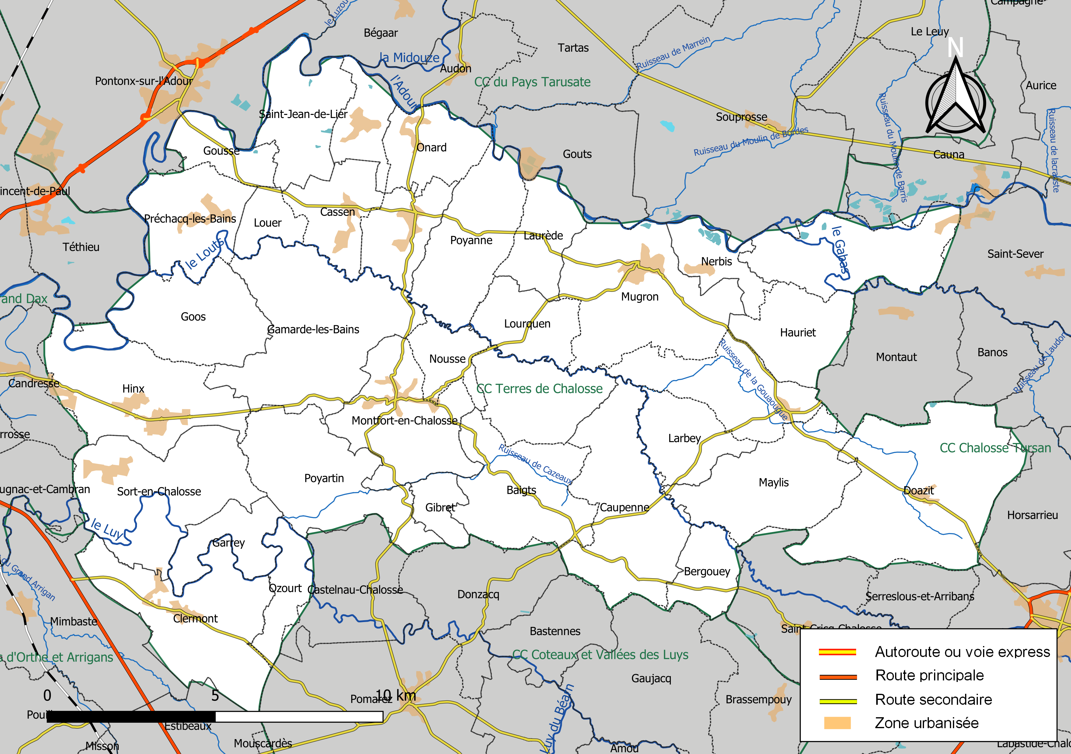 Carte géographique de la Communauté de communes Terres de Chalosse, département des Landes, France. Composition au 1er janvier 2019.